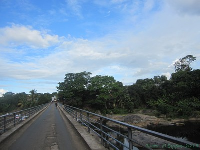 Antsirabe-Nord (Sava) et la RN 5a